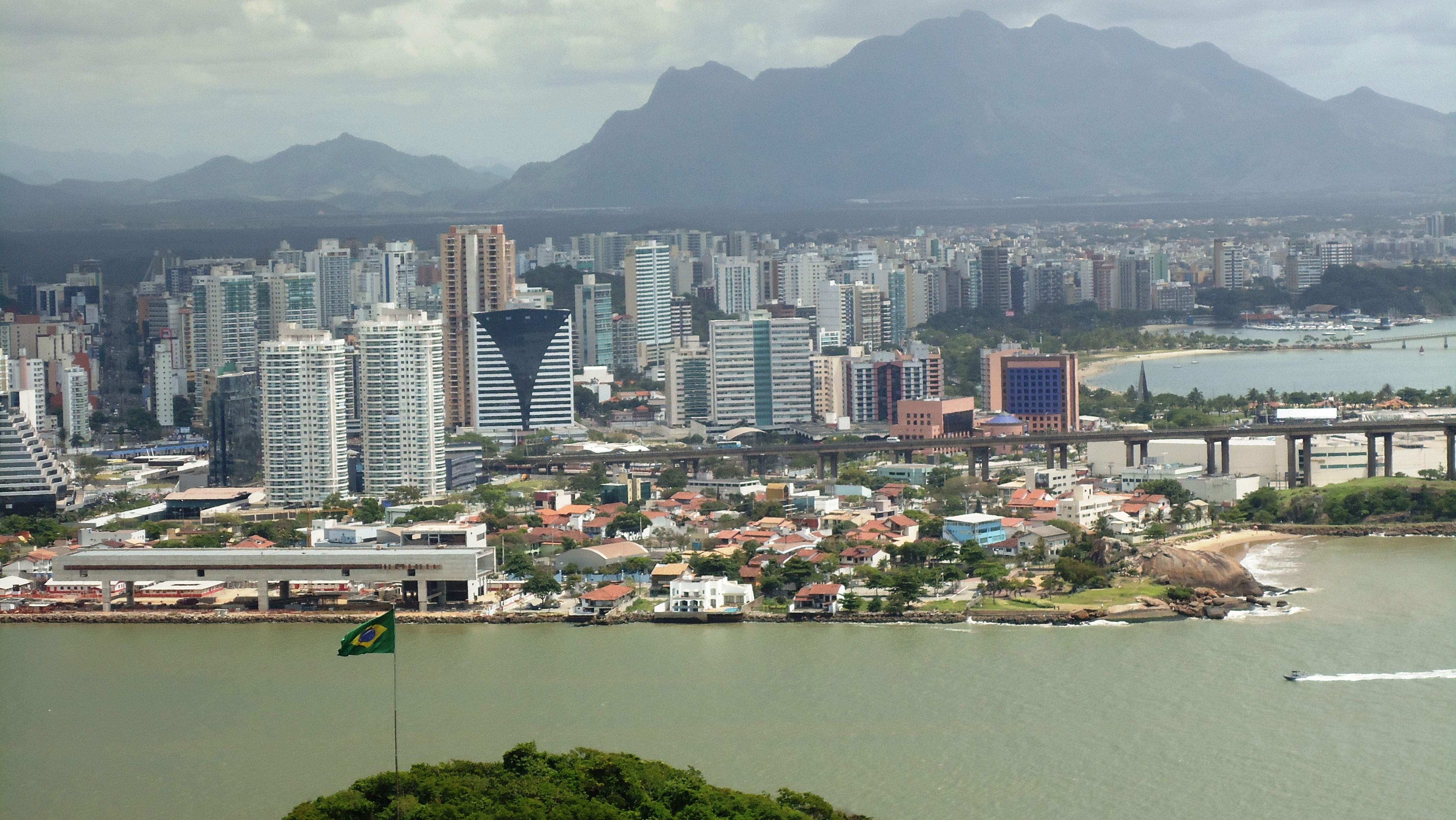 Vitória-ES